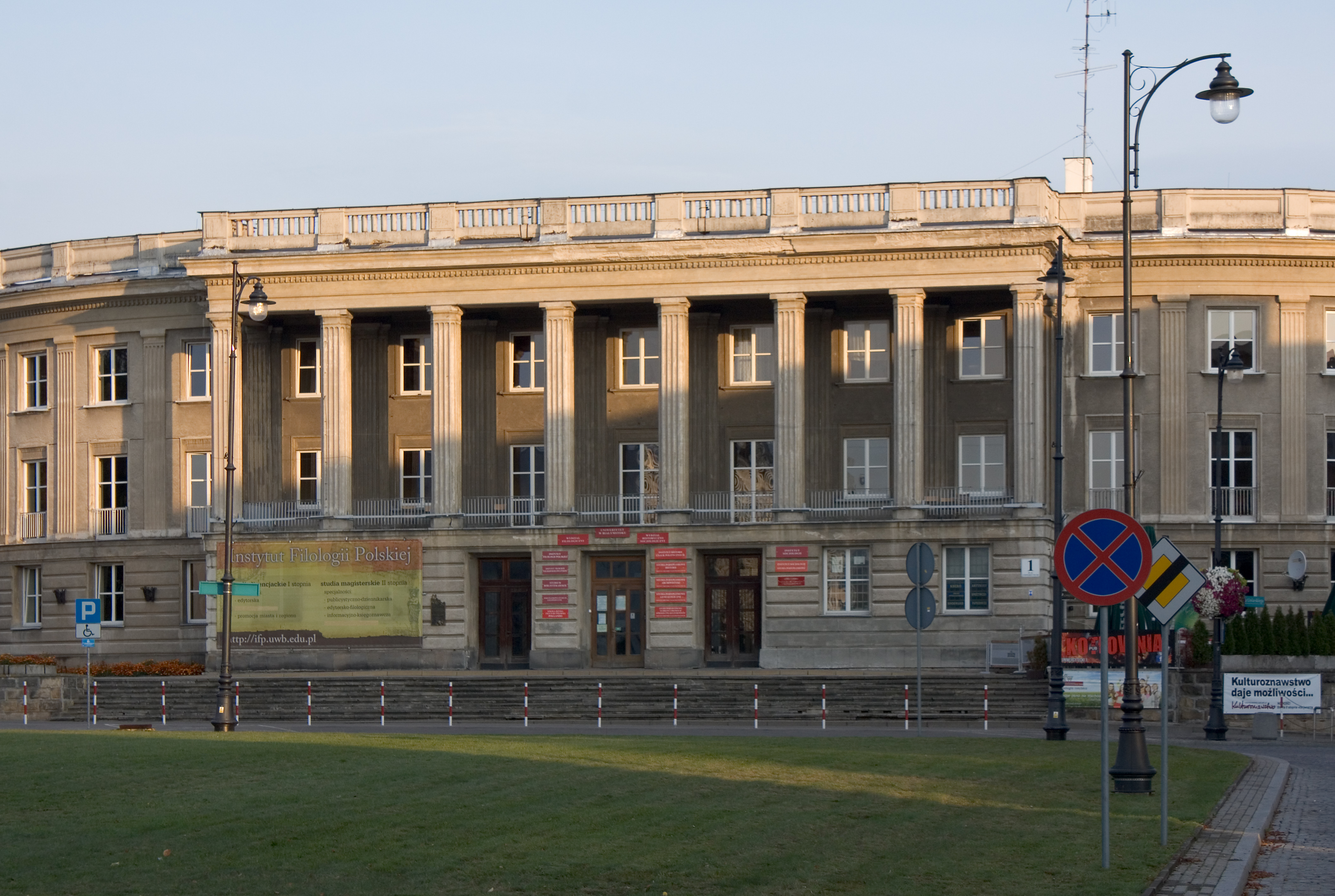 Białystok, Dom Partii (KW PZPR), ob. Filia UW, 1951-1952